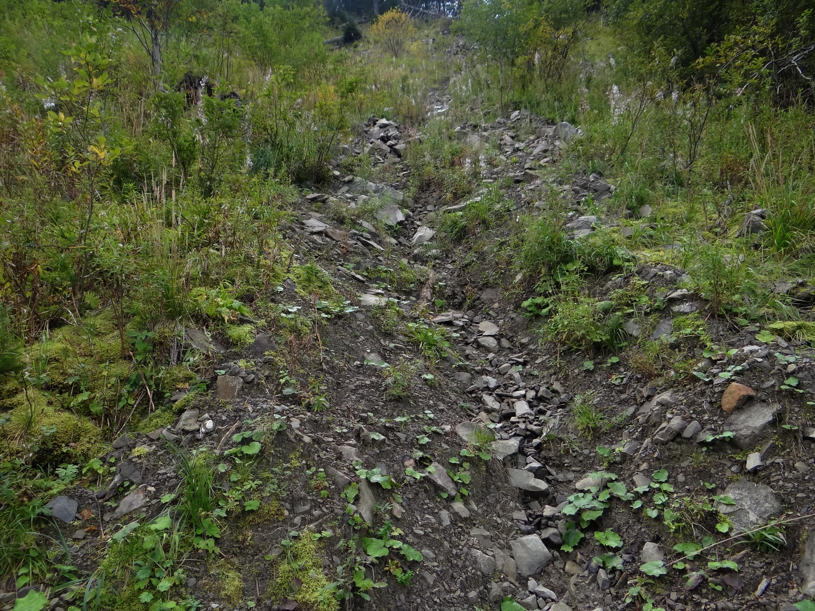 Zerwa Cylowa pod Małą Babią Górą